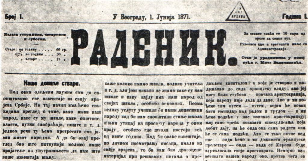 Radenik, prve socijalističke novine u Srbiji i na Balkanu, koje je izdavao Svetozar Marković.